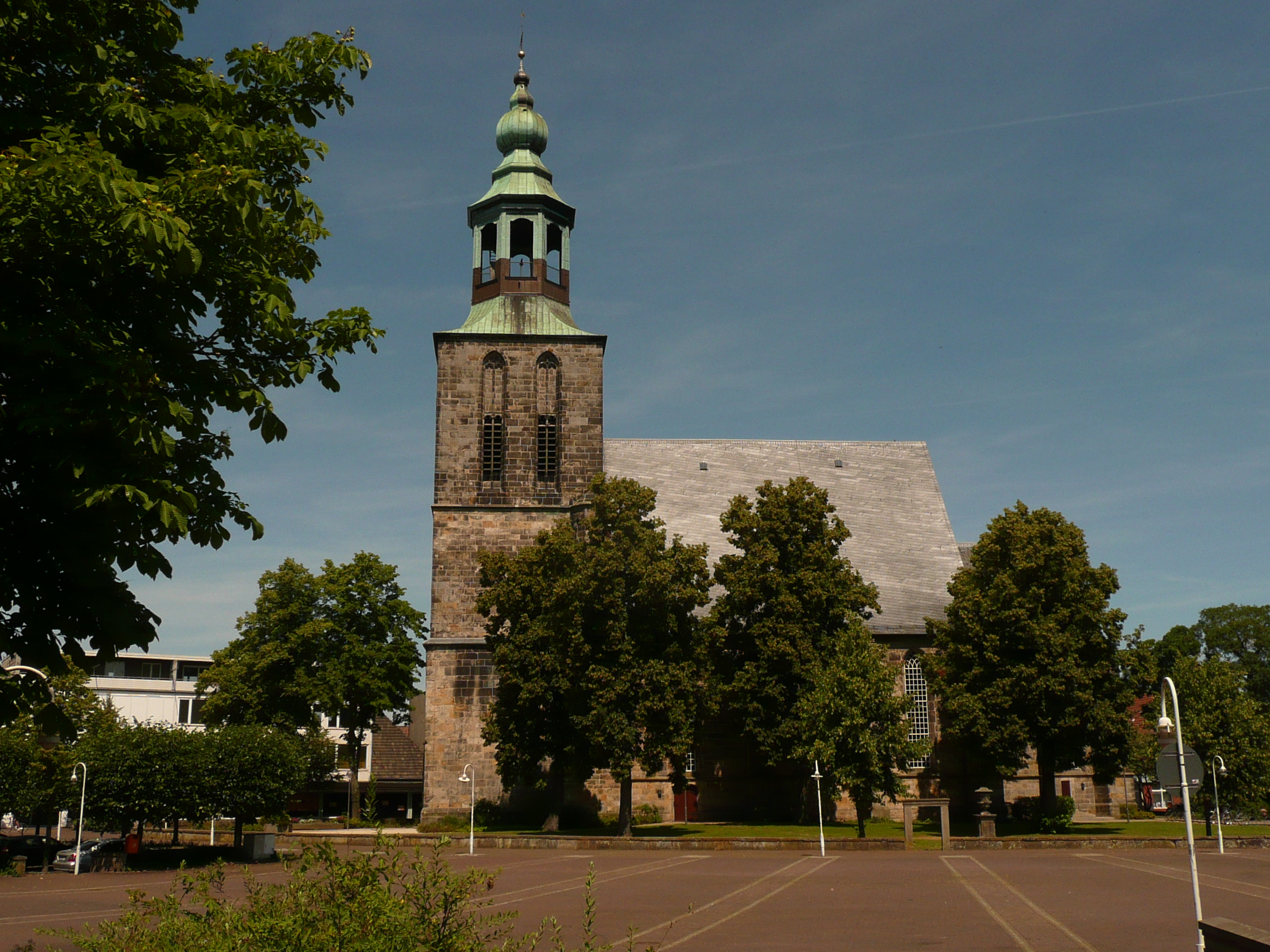 Alte Kirche am Markt, früher St. Ludgerus, heute ev.-ref. Kirchengemeinde